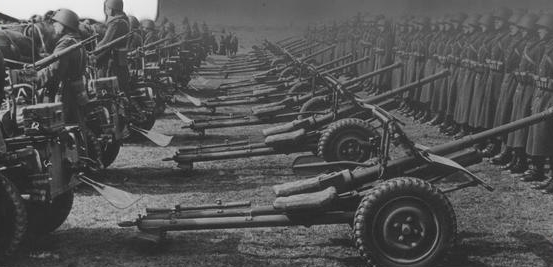 Kolumna polskich armat przeciwpancernych wz. 36 z przodkami w zaprzęgu dwukonnym.